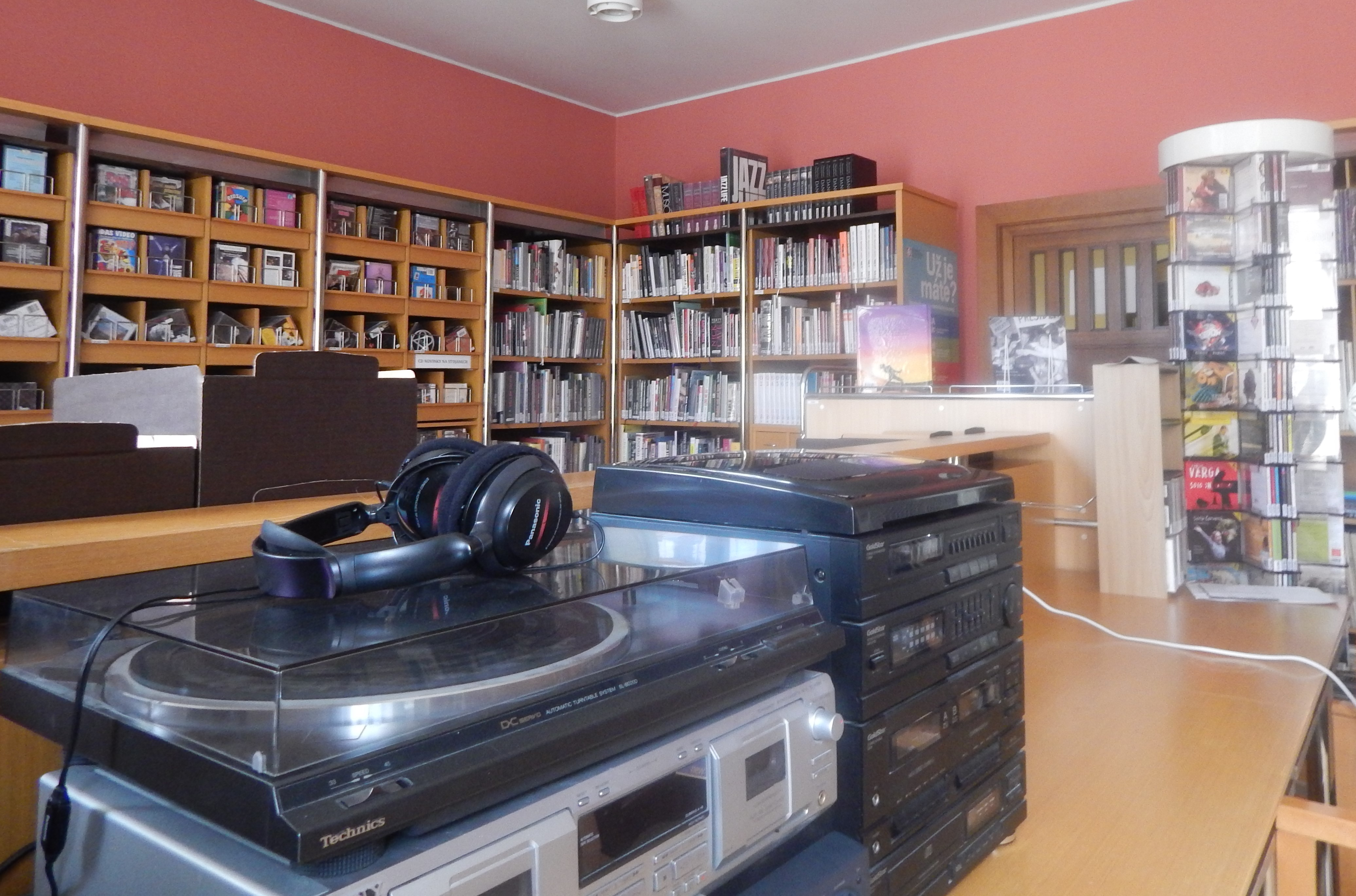 Hudební oddělení, Krajská knihovna v Pardubicích, 2019